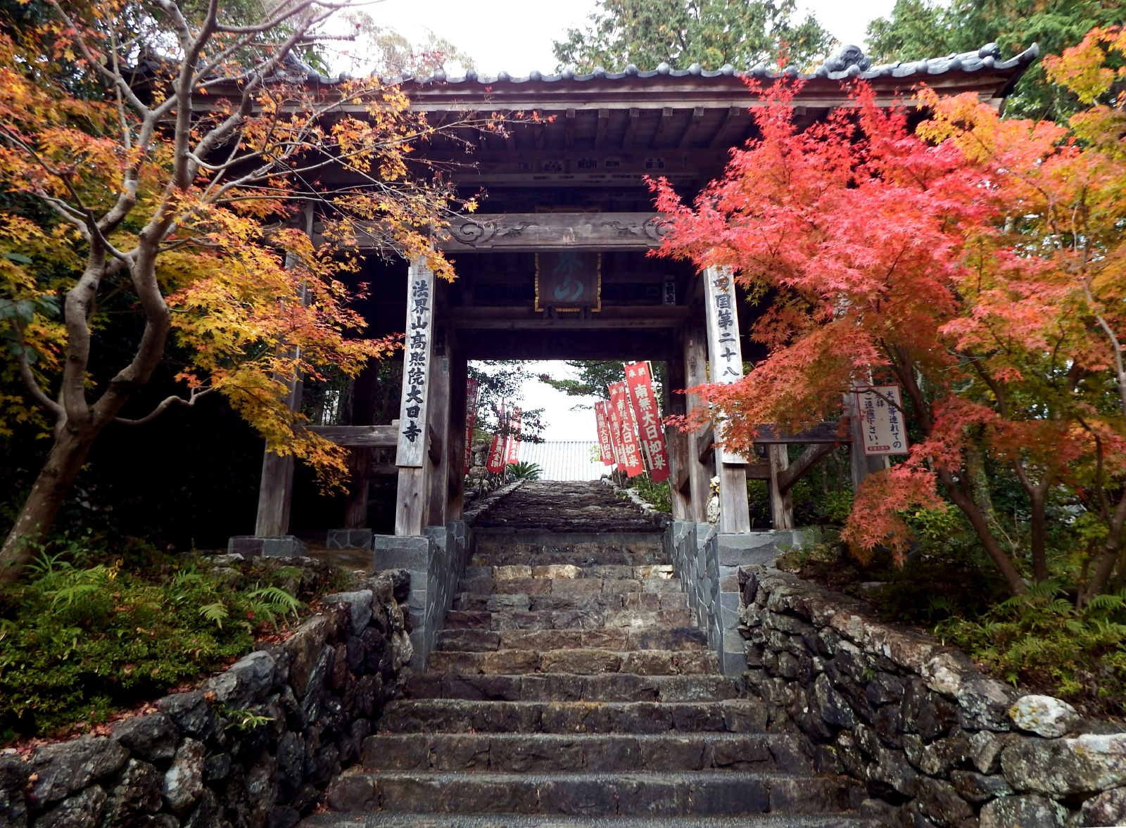 土佐大日寺の山門